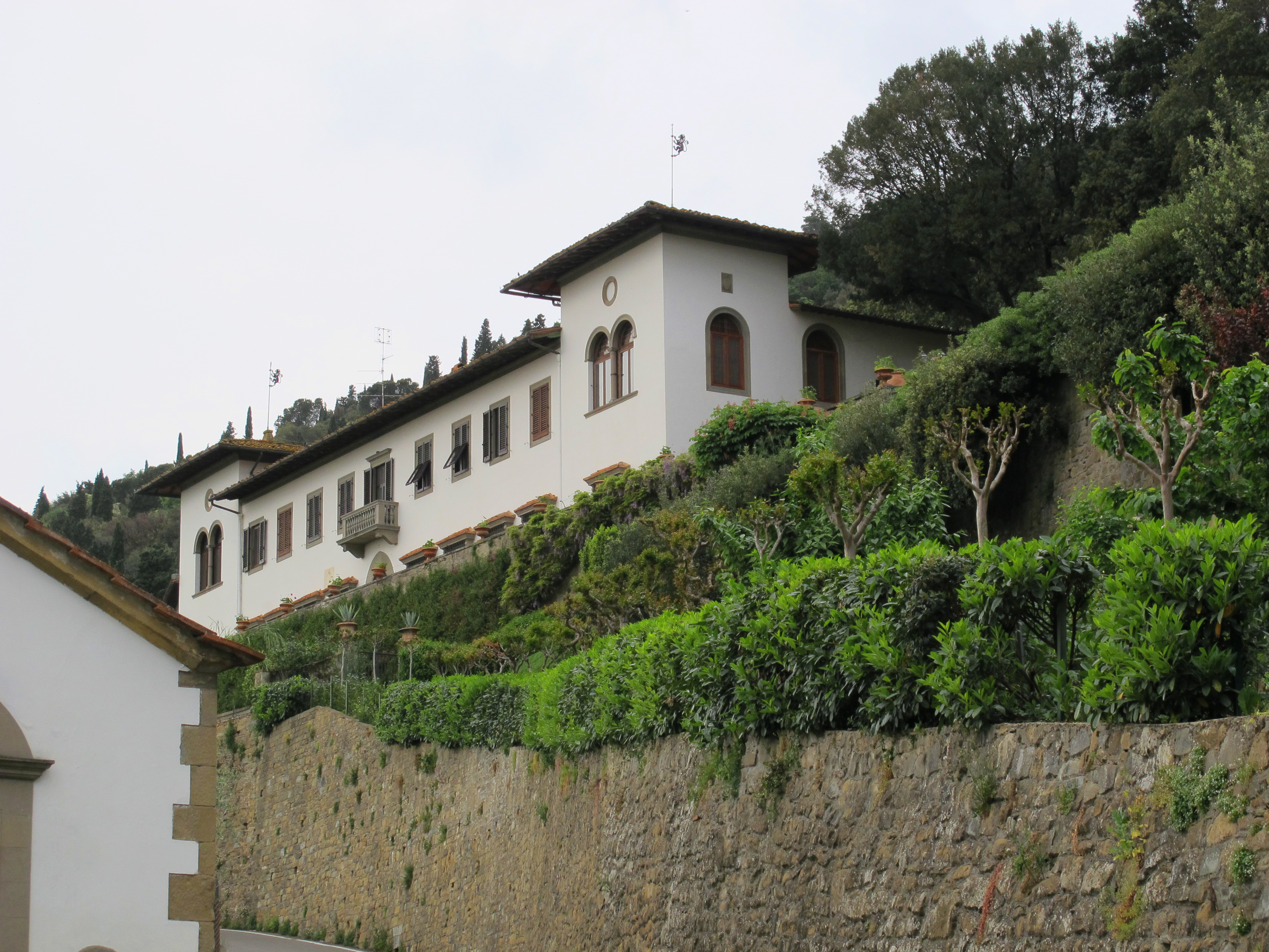 Villa il palagio di maiano vista dalla strada